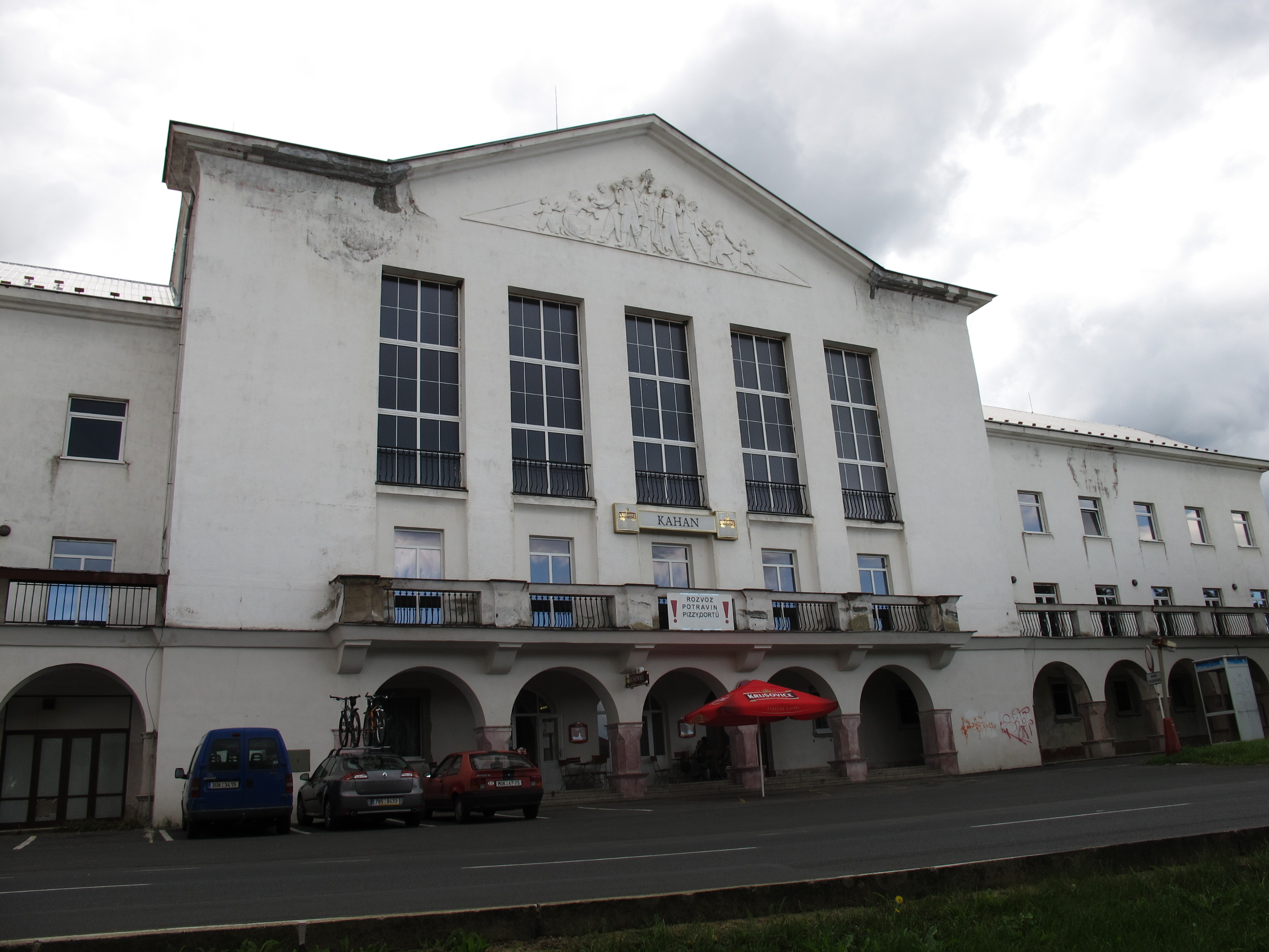 Kulturní dům v Meziboří